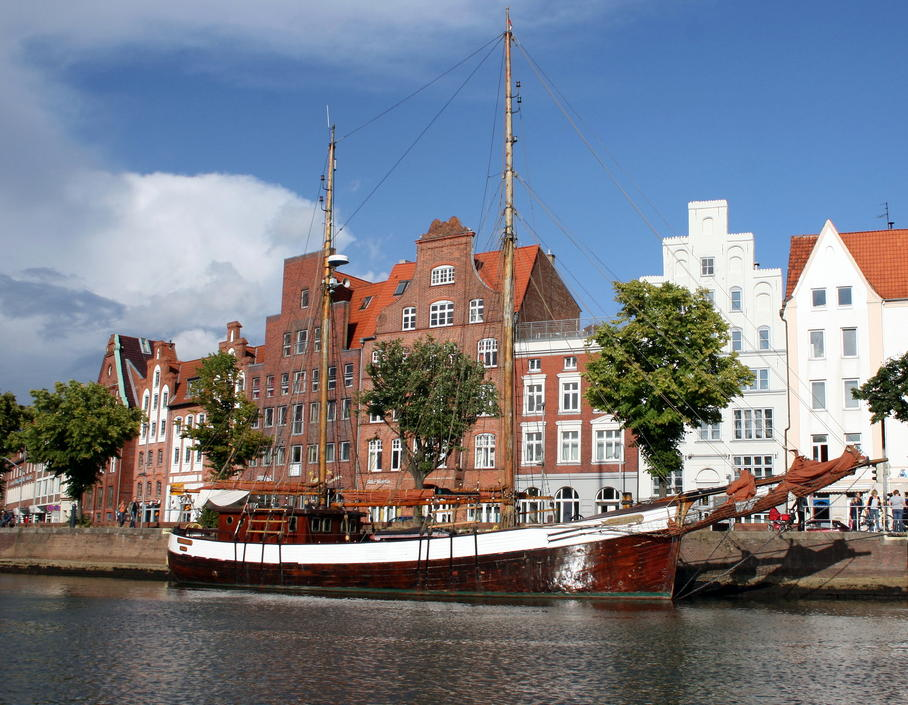 La galeasse Fridthjof - Musée portuaire de Lubeck